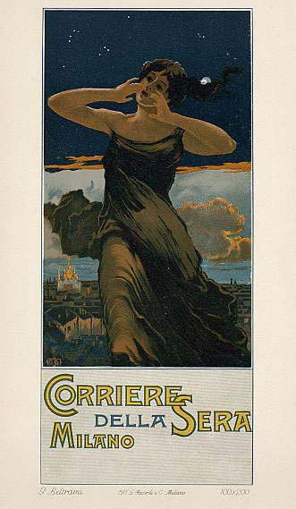 Affiche: Corriere della Sera. 110 x 200 cm. G. Ricordi Milano.